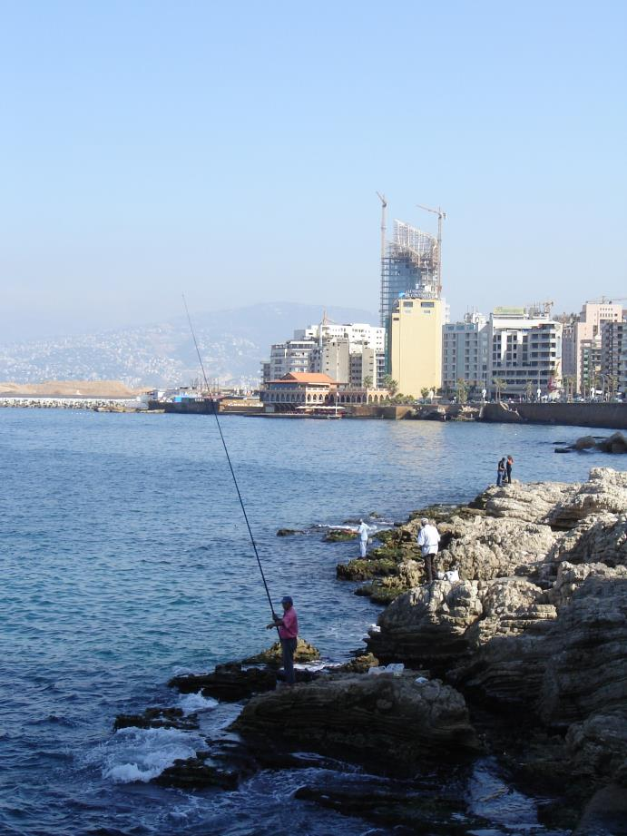 Küste von Beirut.